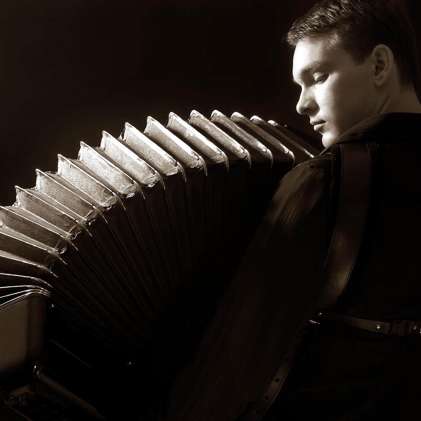 jeremy simon